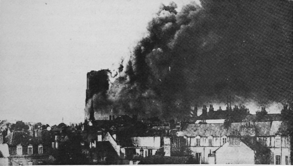 sur une vue ancienne.